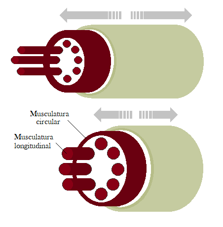 Na ilustração é possível observar a ação das fibras musculares tanto da camada de musculatura circular, que está contraída no esquema superior, como da camada de musculatura longitudinal, contraída no esquema inferior.